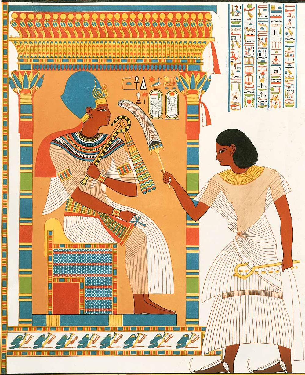 Tutanchamon, 18. dynastie